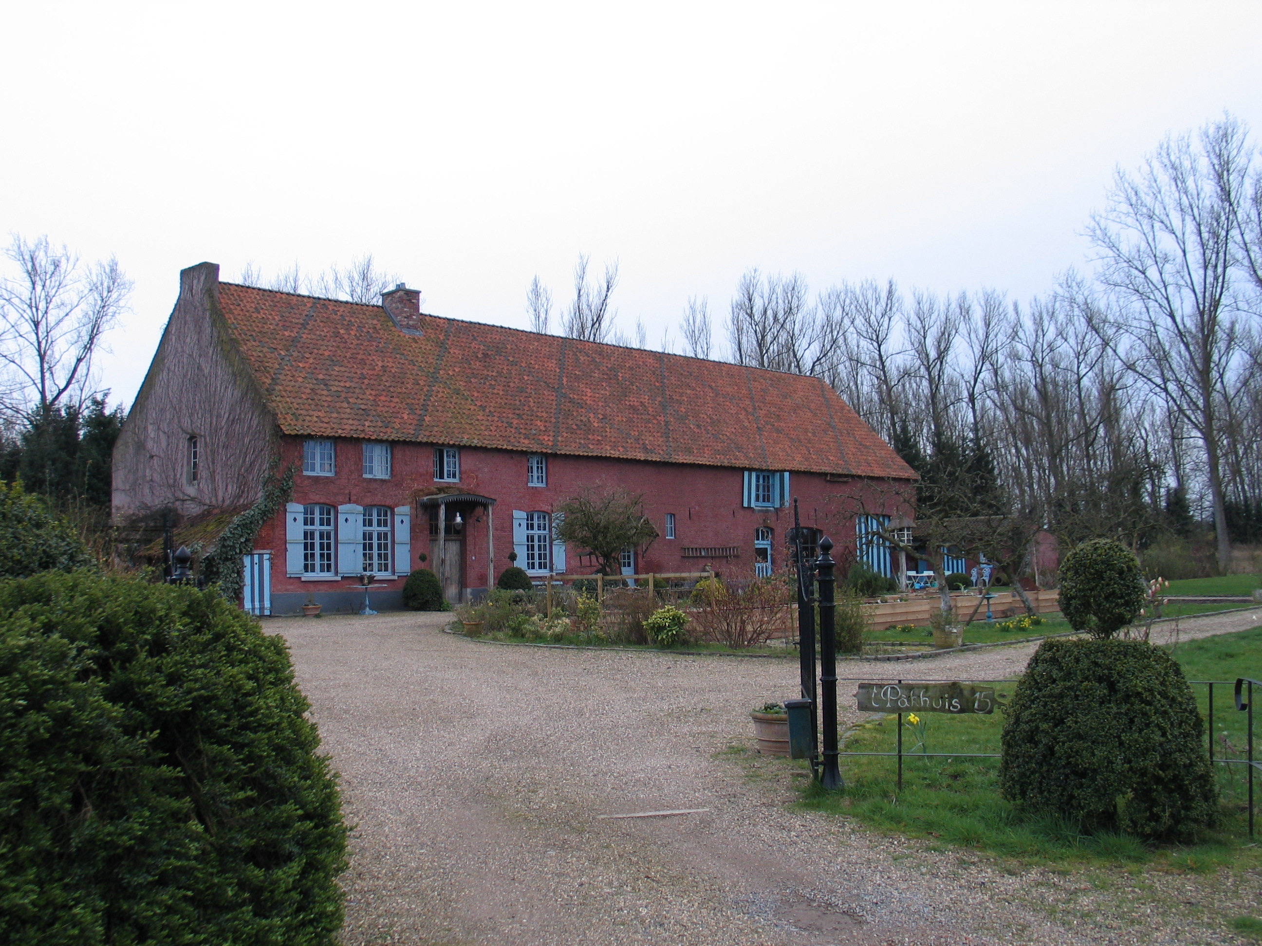 Het pakhuis in Lummen, België